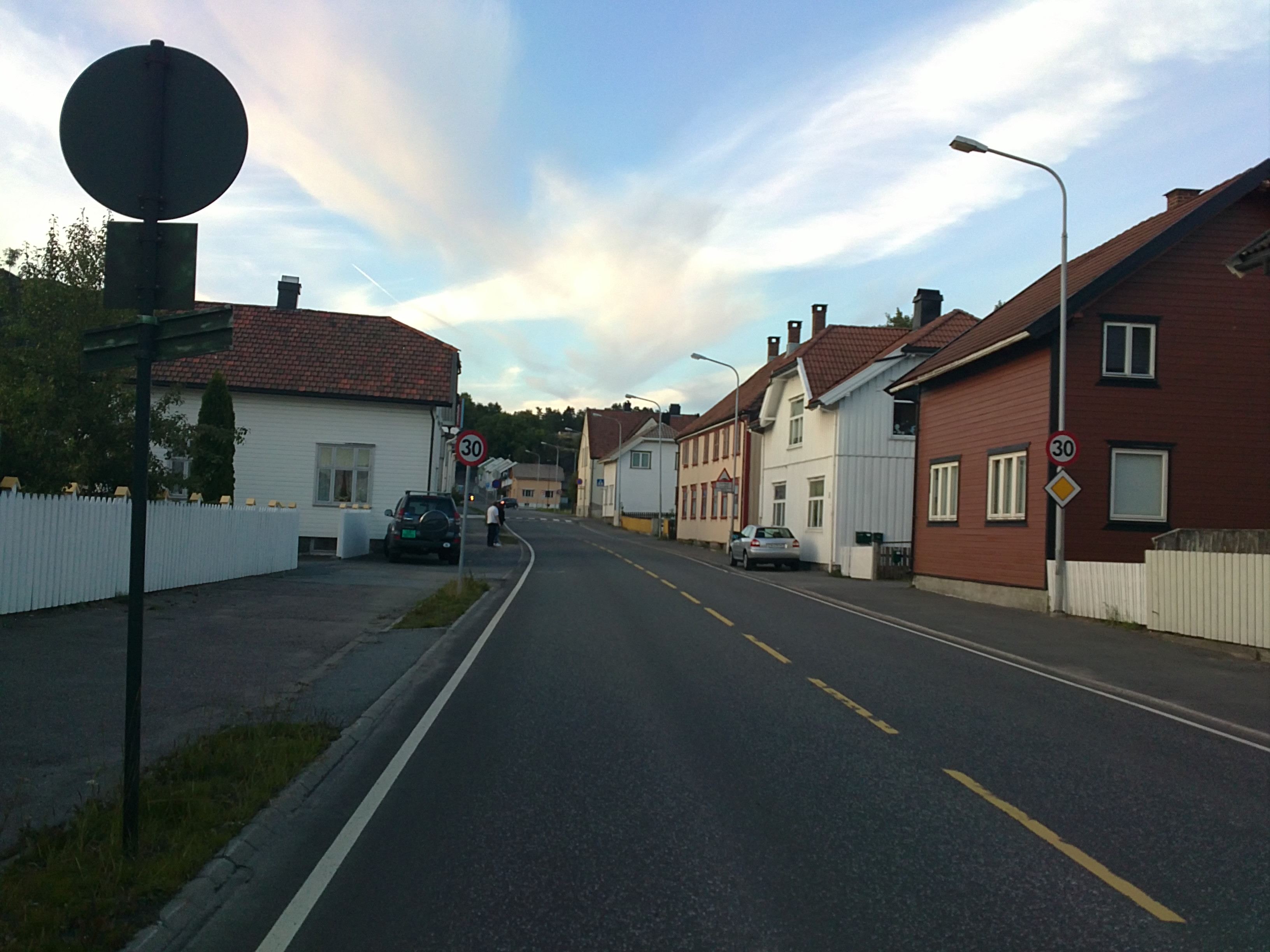 Bilde av Reipbanegata, Larvik.